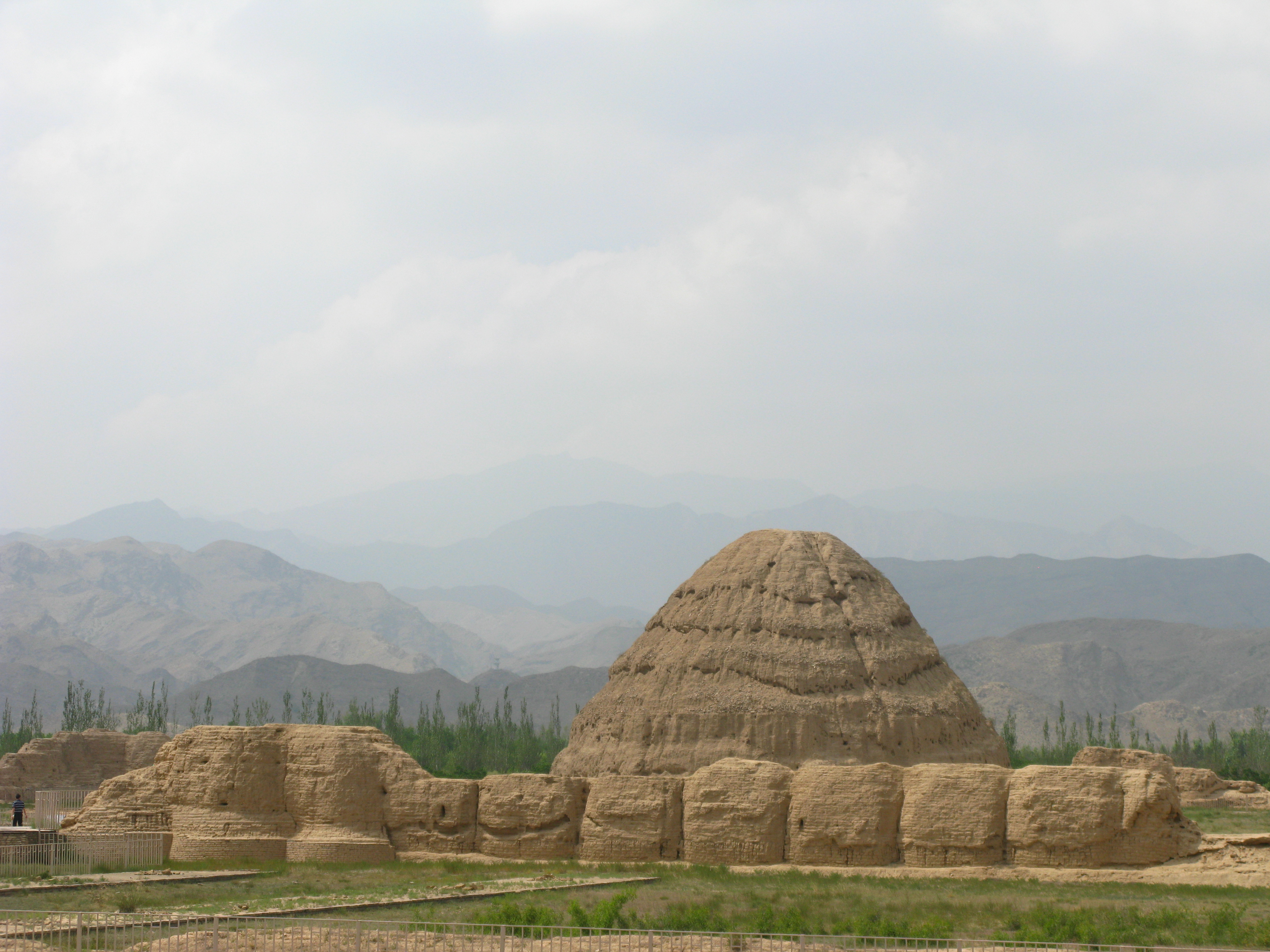 Xia tombs